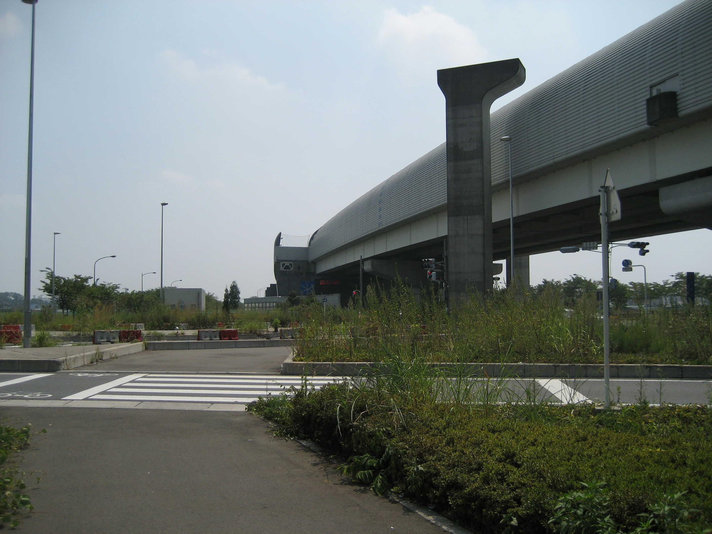 東埼玉道路八潮ジャンクション付近外環側